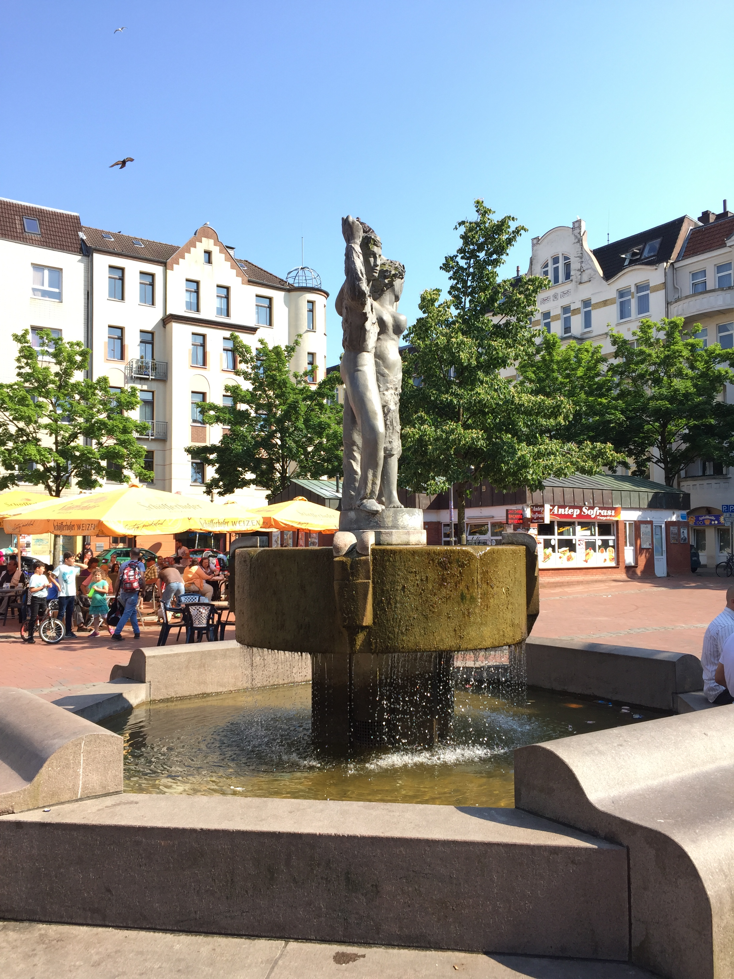 Vinetabrunnen Kiel-Gaarden